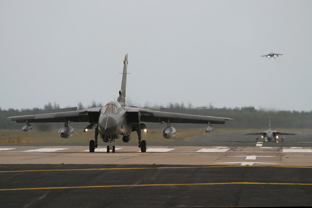 Busy Base